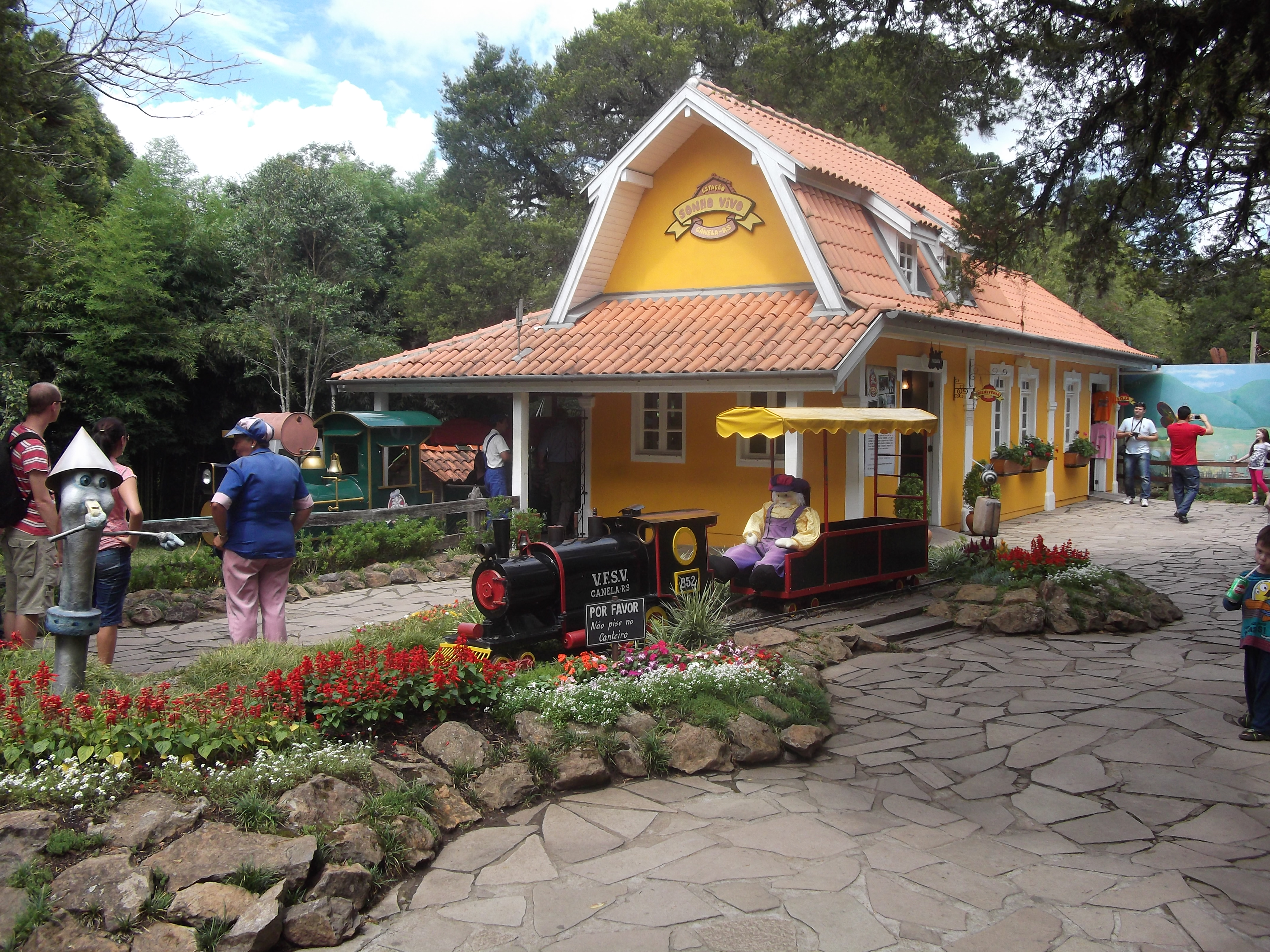 Parque Estadual do Caracol, Canela, Rio Grande do Sul, Brasil